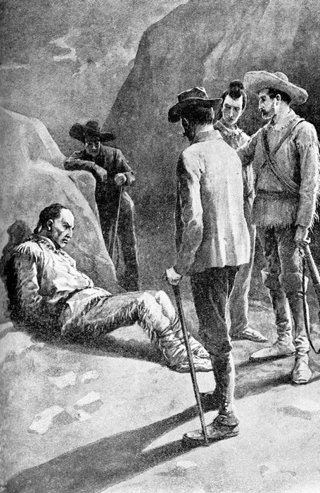 Ilustrace ke knize Karla Maye Černý mustang (nakl. Alois Hynek, pravděpodobně 1908)